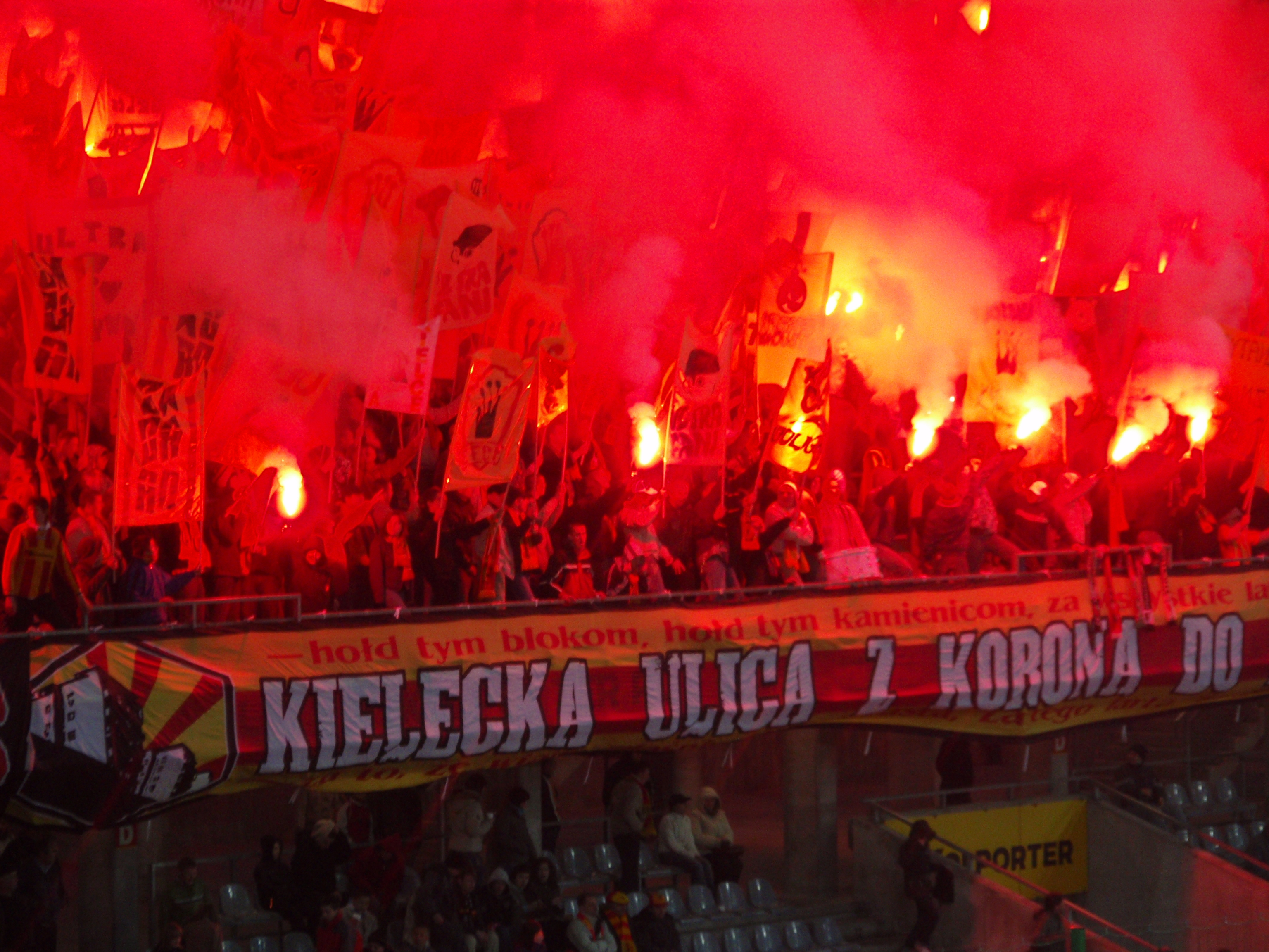 Oprawa meczowa kibiców kieleckiej Korony